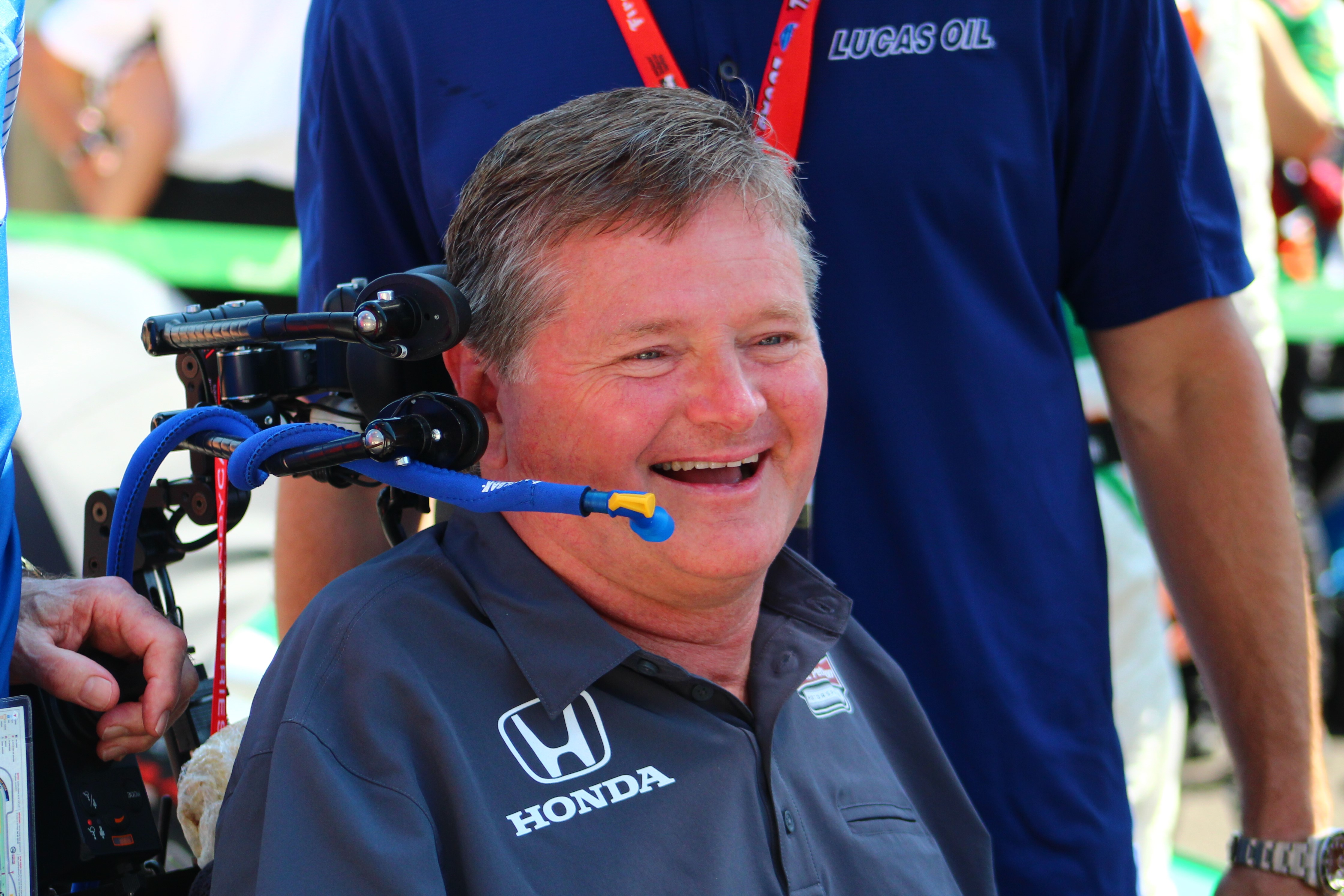 2018 Indianapolis 500